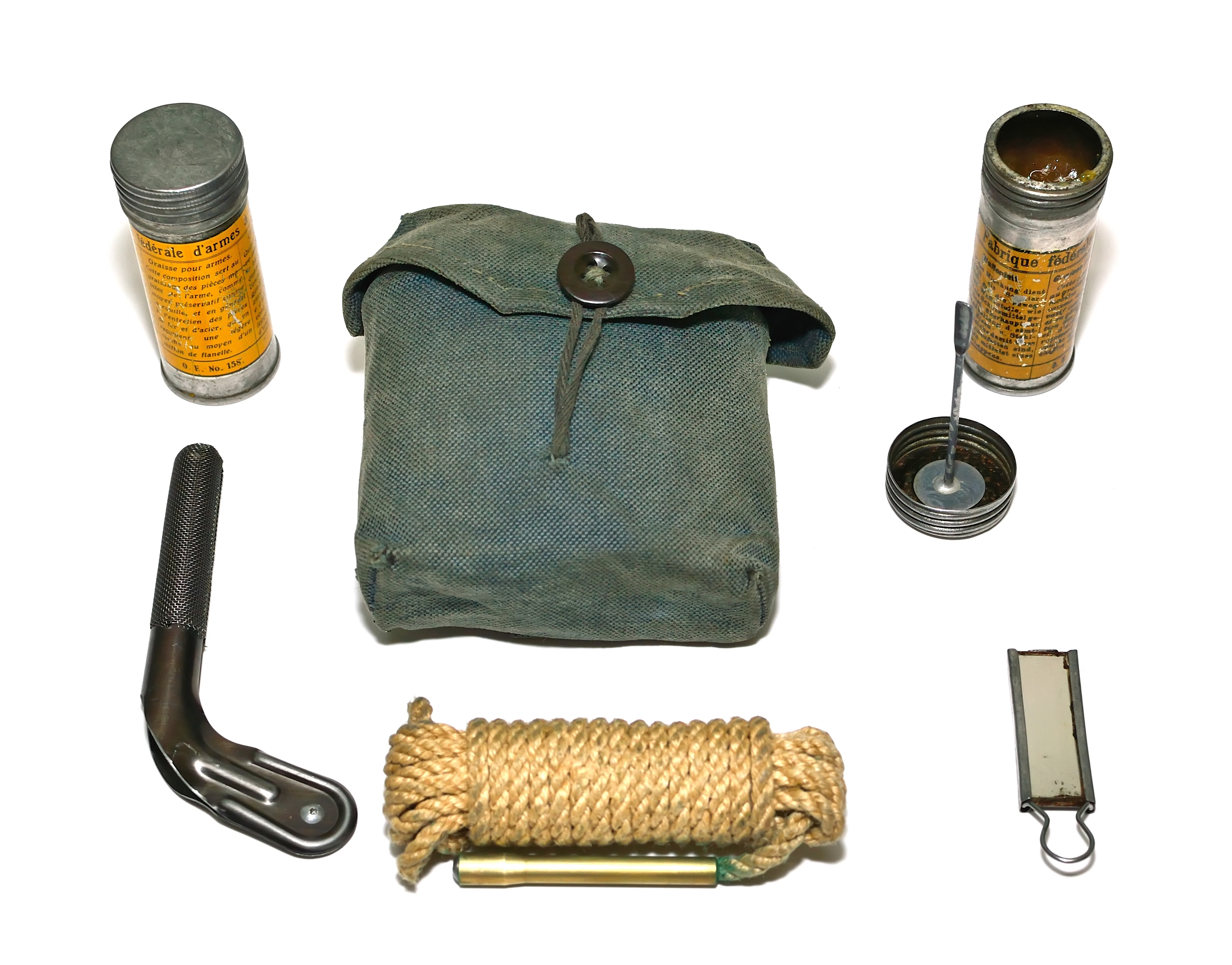 Armée suisse, sachet de nettoyage pour fusil